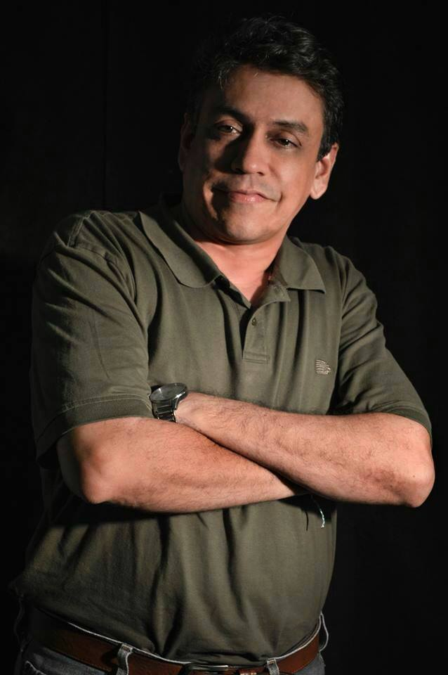 Poeta colombiano Winston Morales, año 2014